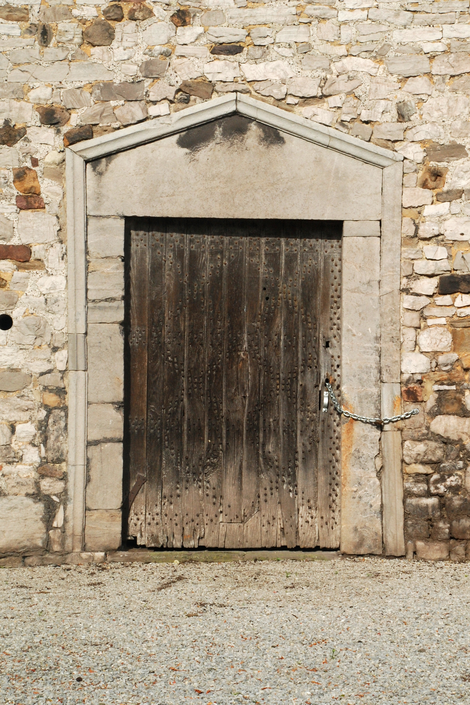 Belgique - Hainaut - Aiseau-Presles - Pont-de-Loup - Tour romane